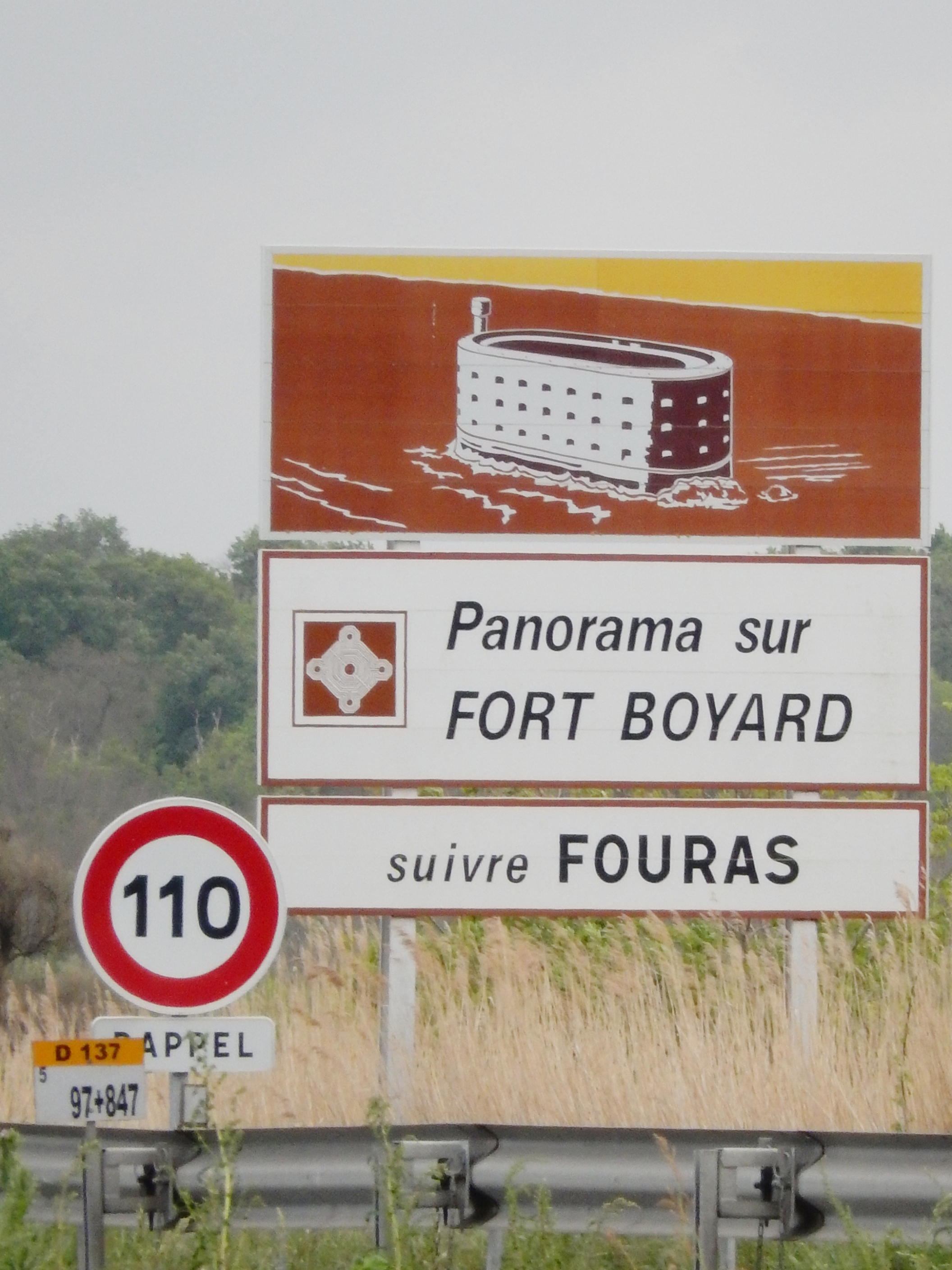 Un panneau H32 français, installé au bord de la route D137, sur la commune d'Yves, dans le sens La Rochelle → Rochefort. Il indique à l'automobiliste qu'il peut avoir une jolie vue sur le Fort Boyard, à condition d'emprunter la sortie en direction de Fouras. Il est accompagné d'un panneau B14 et d'un panonceau M9z, rappelant la limitation de vitesse en vigueur sur cette partie de la route.